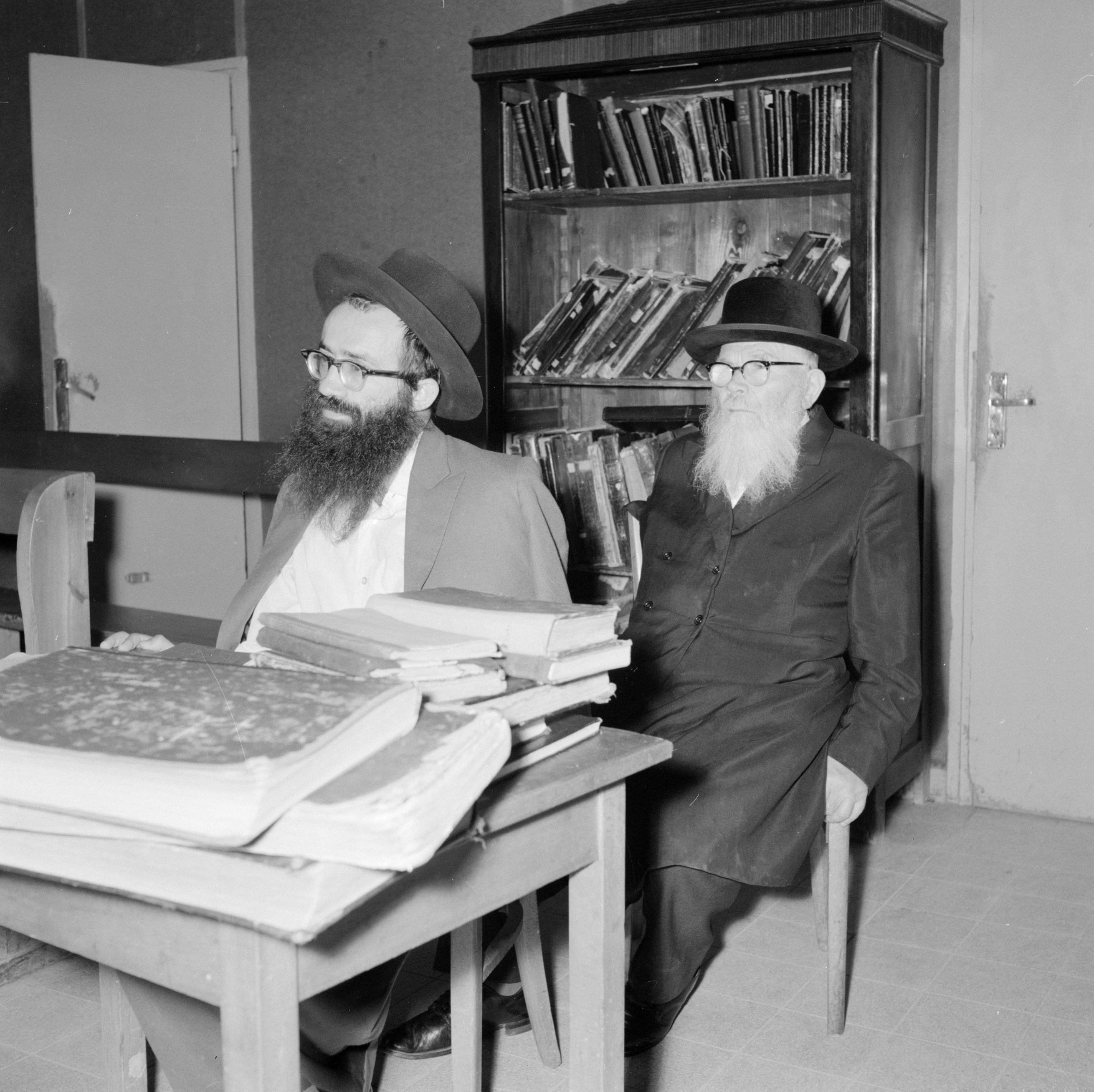 Bijeenkomst in een jesjiva (Talmoedschool). Reportage / Serie: Israël: Kfar Hassidim (Hasidim). Annotatie: Een jesjiva of jesjieve (ook niet-offcieel geschreven als jesjiewa resp. jesjiewe) is een Talmoedschool speciaal bestemd voor jongens en jongere mannen die niet gehuwd zijn.